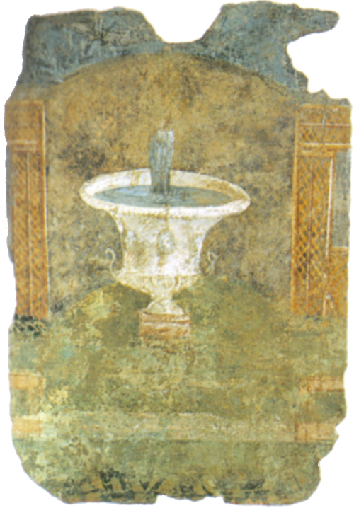 Villa della farnesina a Roma: affreschi con fontana e incannucciata, ora al Museo nazionale romano.